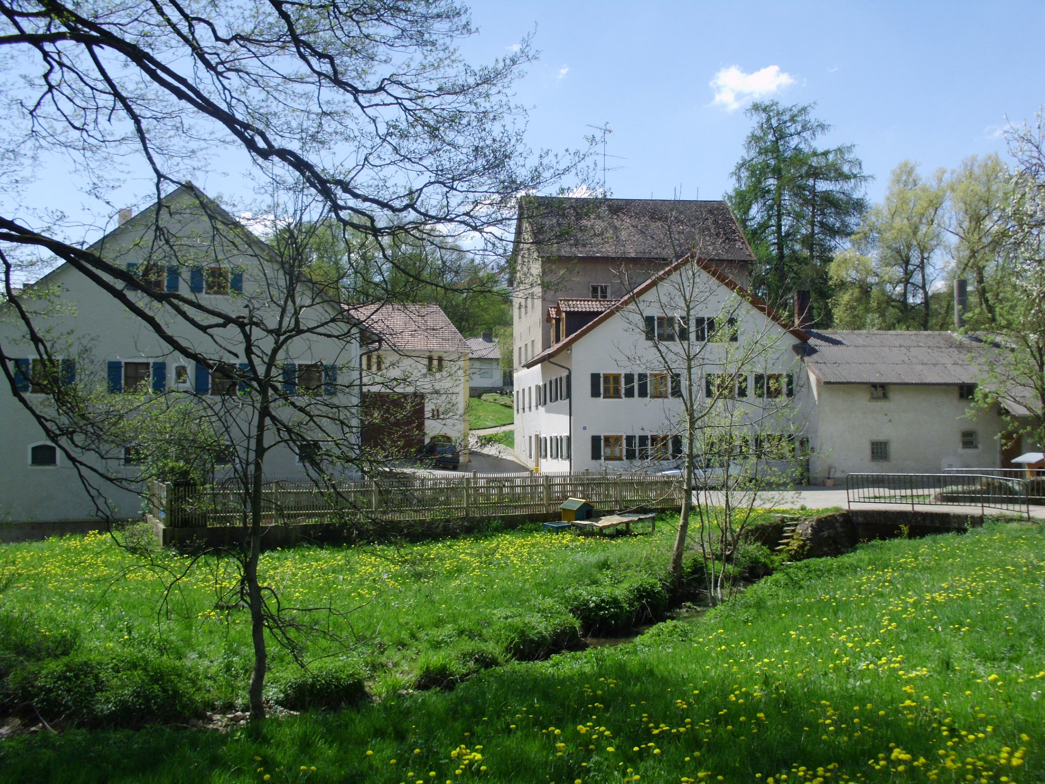 Waldmühle bei Gersdorf, einem Ortsteil von Nennslingen im mittelfränkischen Landkreis Weißenburg-Gunzenhausen